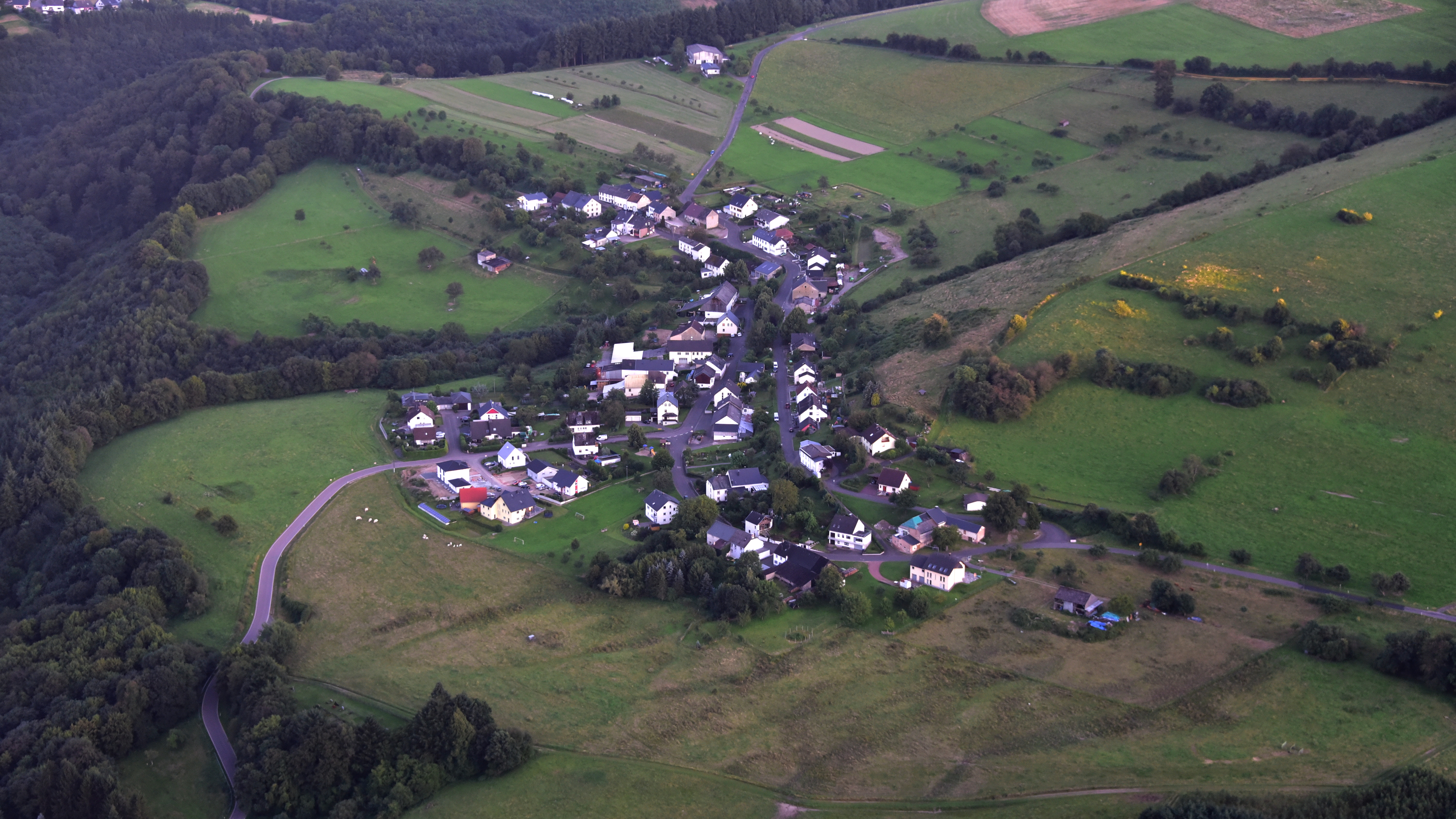 Ollmuth, Luftaufnahme (2016)